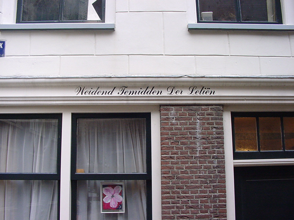 Weidend Temidden Der Leliën staat sinds 1988 op een huis aan de Hooglandschekerkkoorsteeg 2 te Leiden. Het citaat is ontleend aan het bijbelboek Hooglied, 6: 3